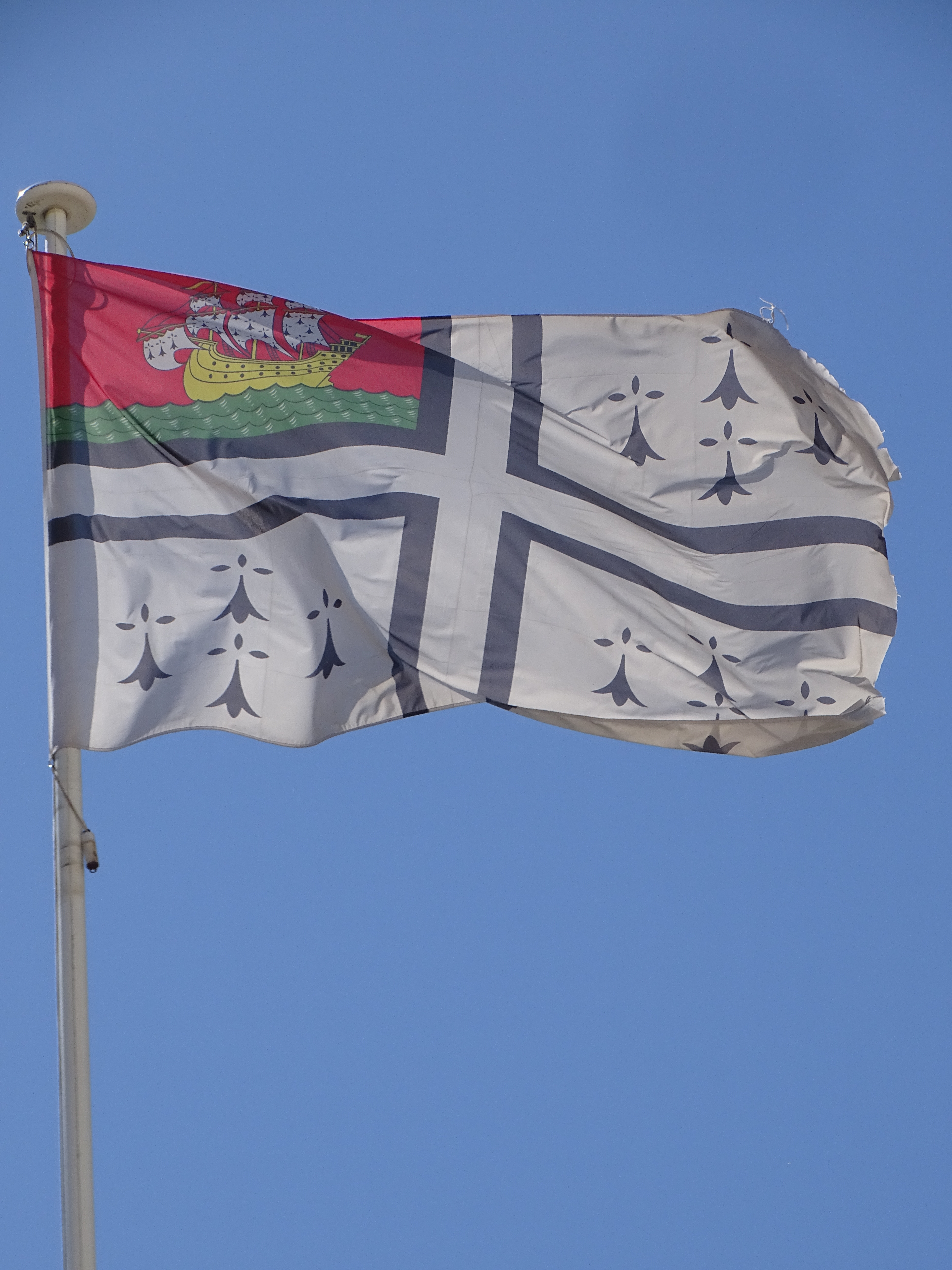 Banniel Kêr-Naoned